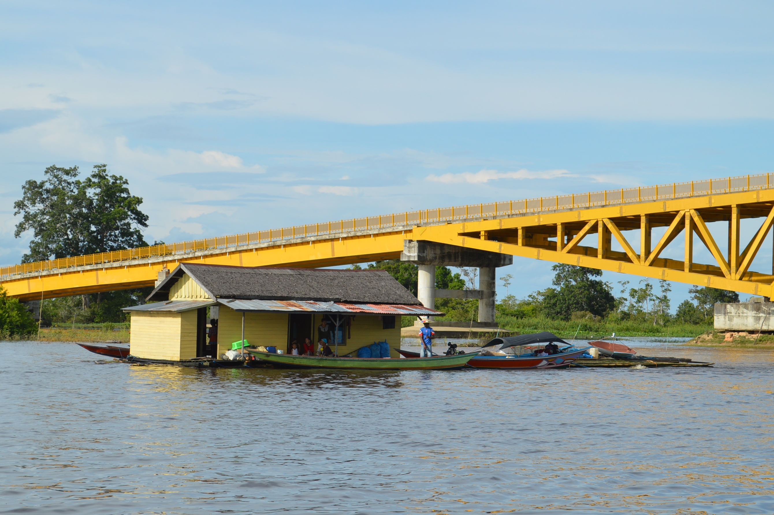 Proses pindah Rumah Lanting dengan bantuan perahu bermesin yang disebut ces atau ketinting. Lokasi di Sungai Pela, Kabupaten Kutai Kartanegara, Kalimantan Timur.